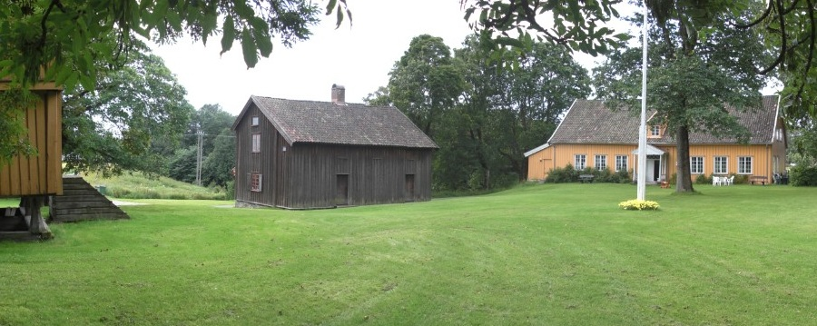 Bilde av Hovedgården og Drengestua på Huseby Gårds tun i Skedsmo.